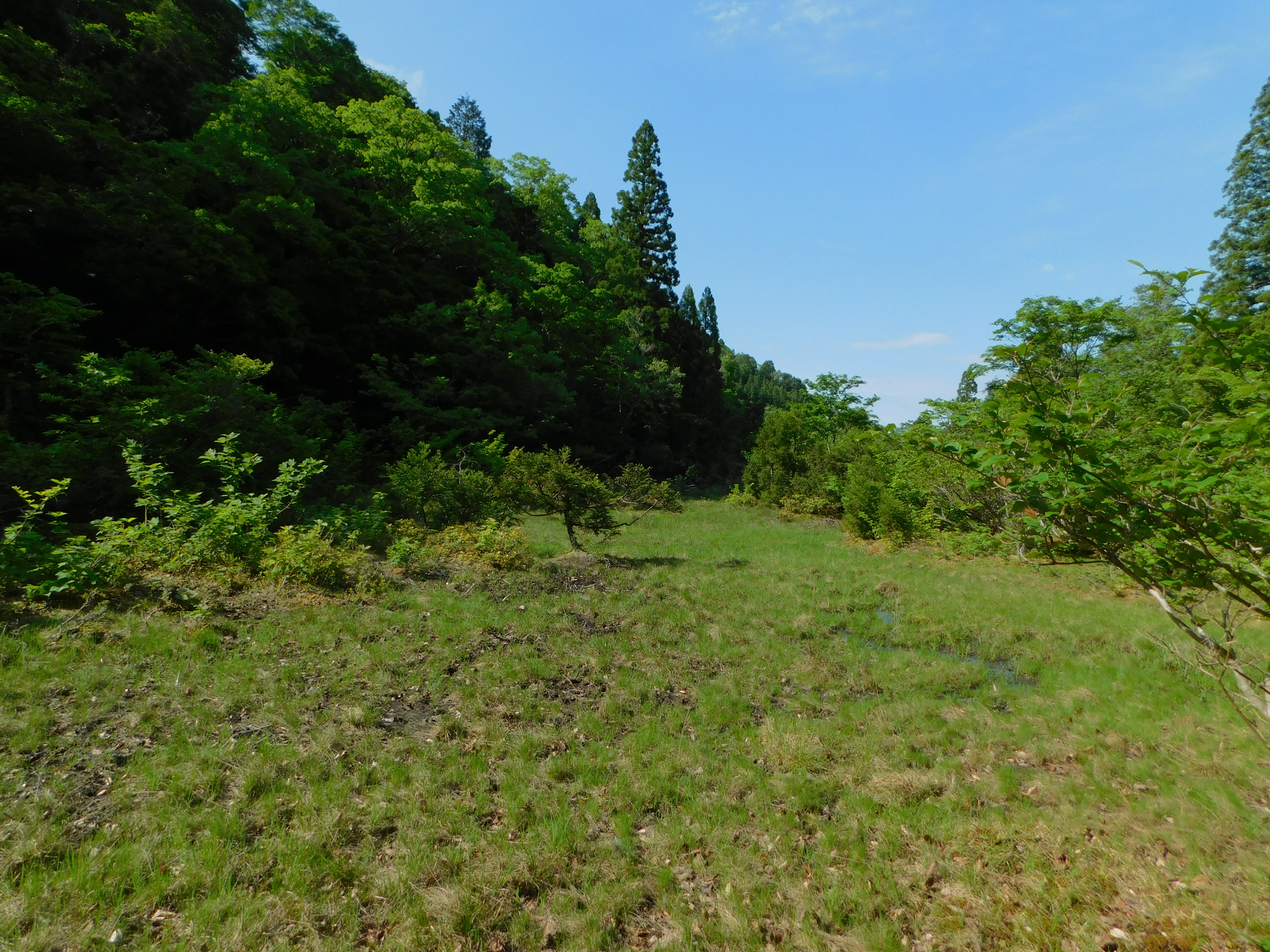 福井県敦賀市の黒河渓谷のアシ谷にある池の原湿原には希少な動植物が見られる。